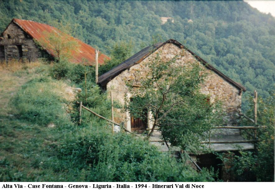 Alta Via - Case Fontana - Genova - Italia - 1994 - Itinerari Val Noci